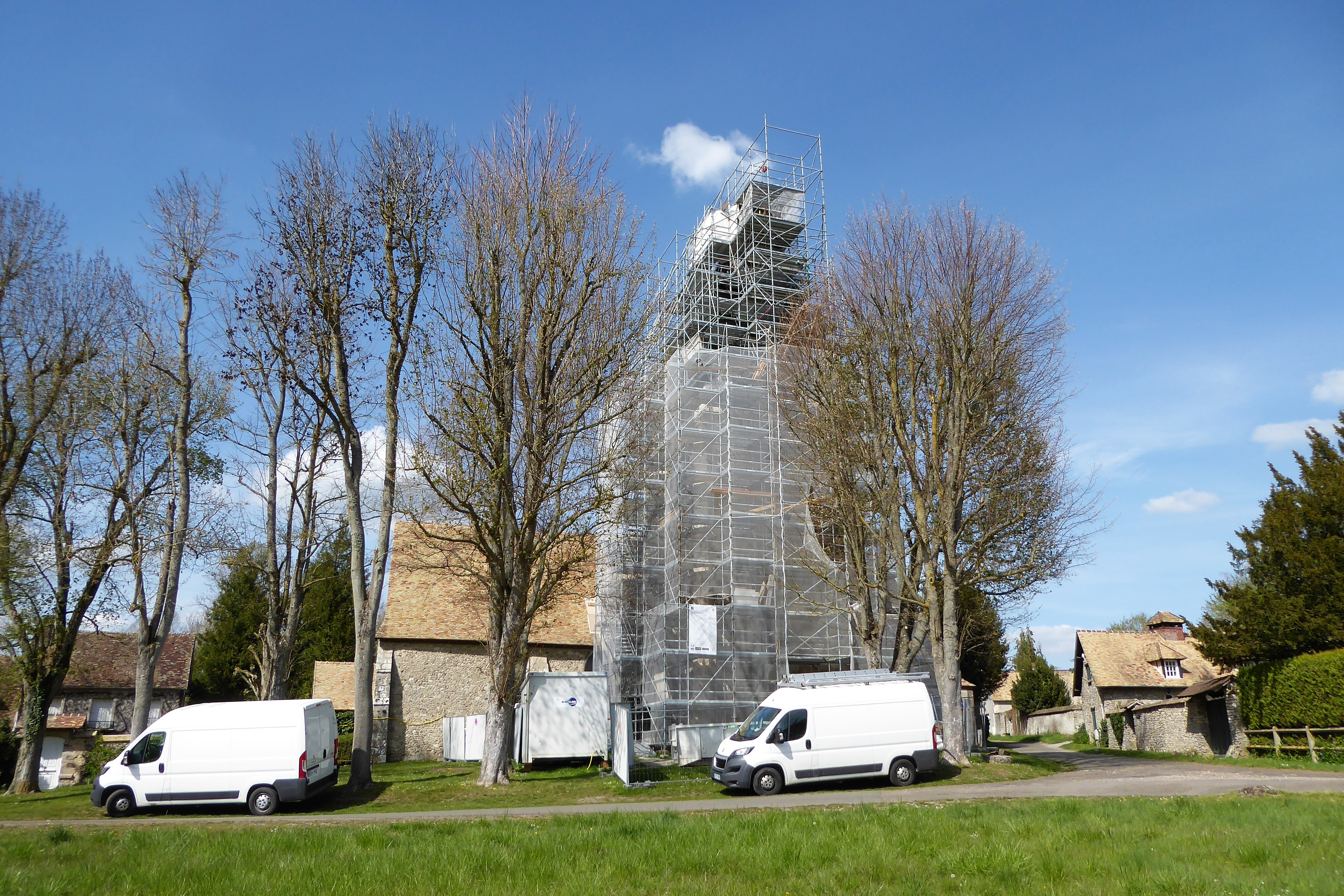 église Saint-Ouen de Saint-Ouen-Marchefroy (avril 2019), Eure-et-Loir, France.